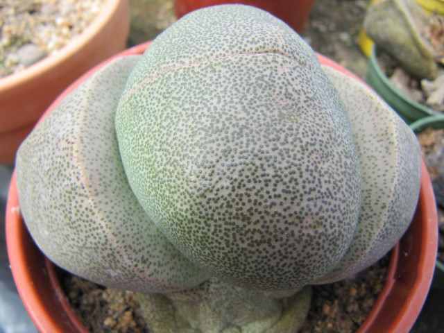 Pleiospilos